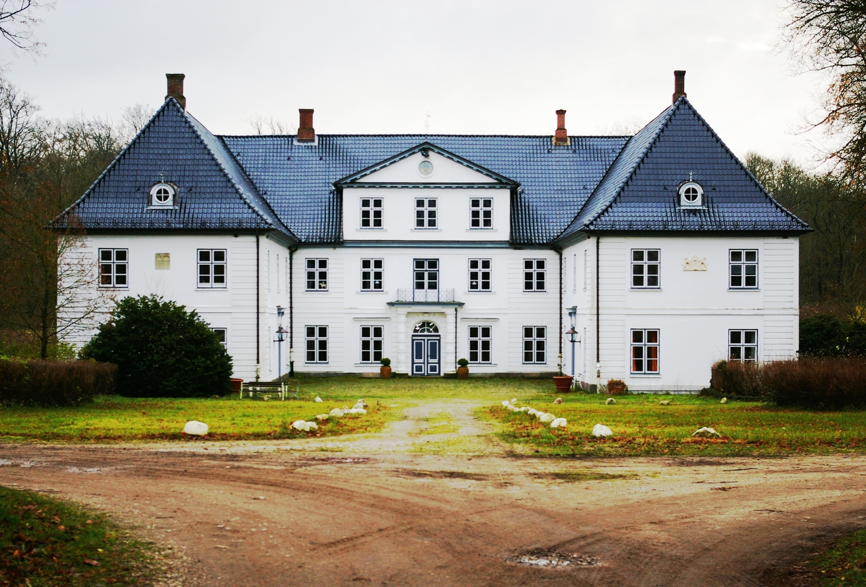 Zweigeschossiger Dreiflügelbau; Gemeinde Westensee. Zustand nach Umbau 1907-1909.